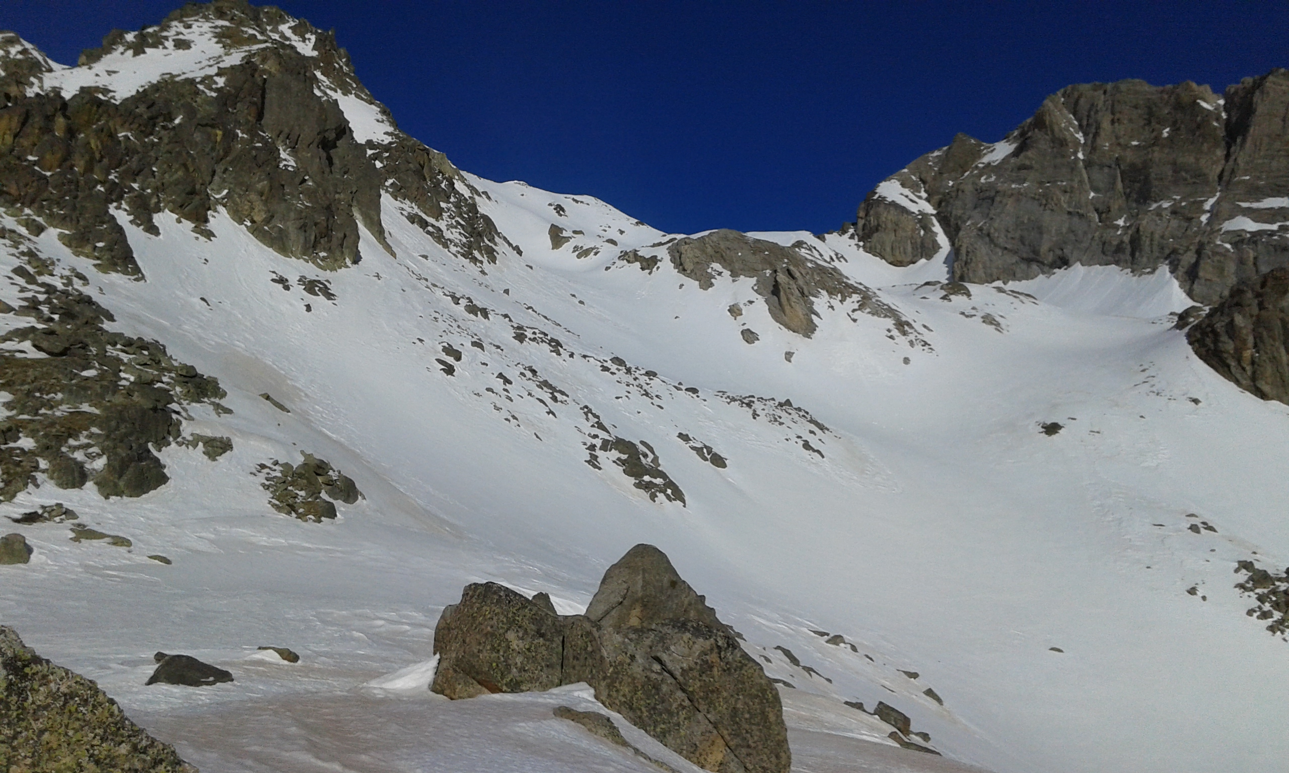 Coll de Gias, a l'esquerra el Cim de Clarabide, a la dreta Punta Lourde Rocheblave